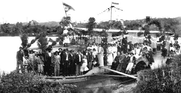 Vapor Visconde de Guarapuava em sua viagem inaugural.